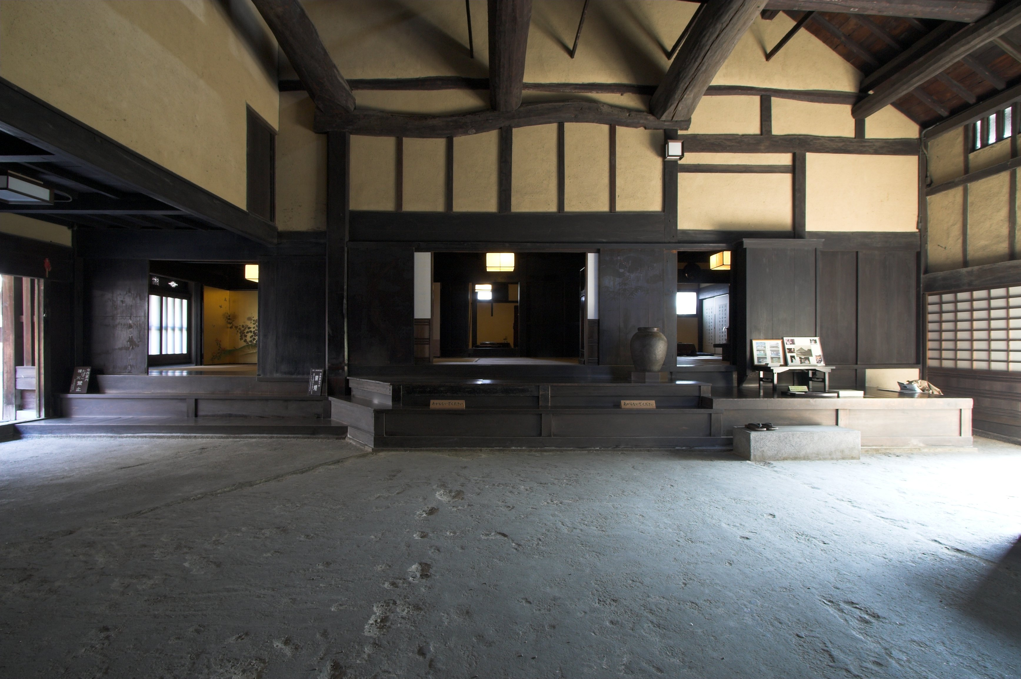 今西家住宅(奈良県橿原市, Japan)